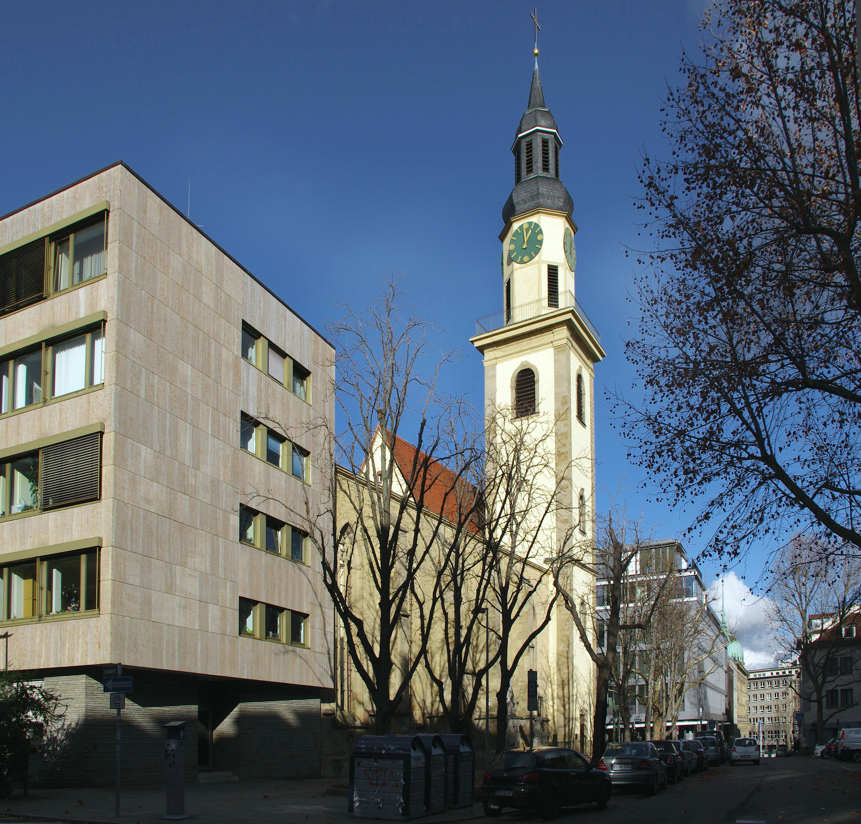 Alter Hospitalhof in Stuttgart (1960-2012), links: Verwaltungsgebäude, rechts: Hospitalkirche.